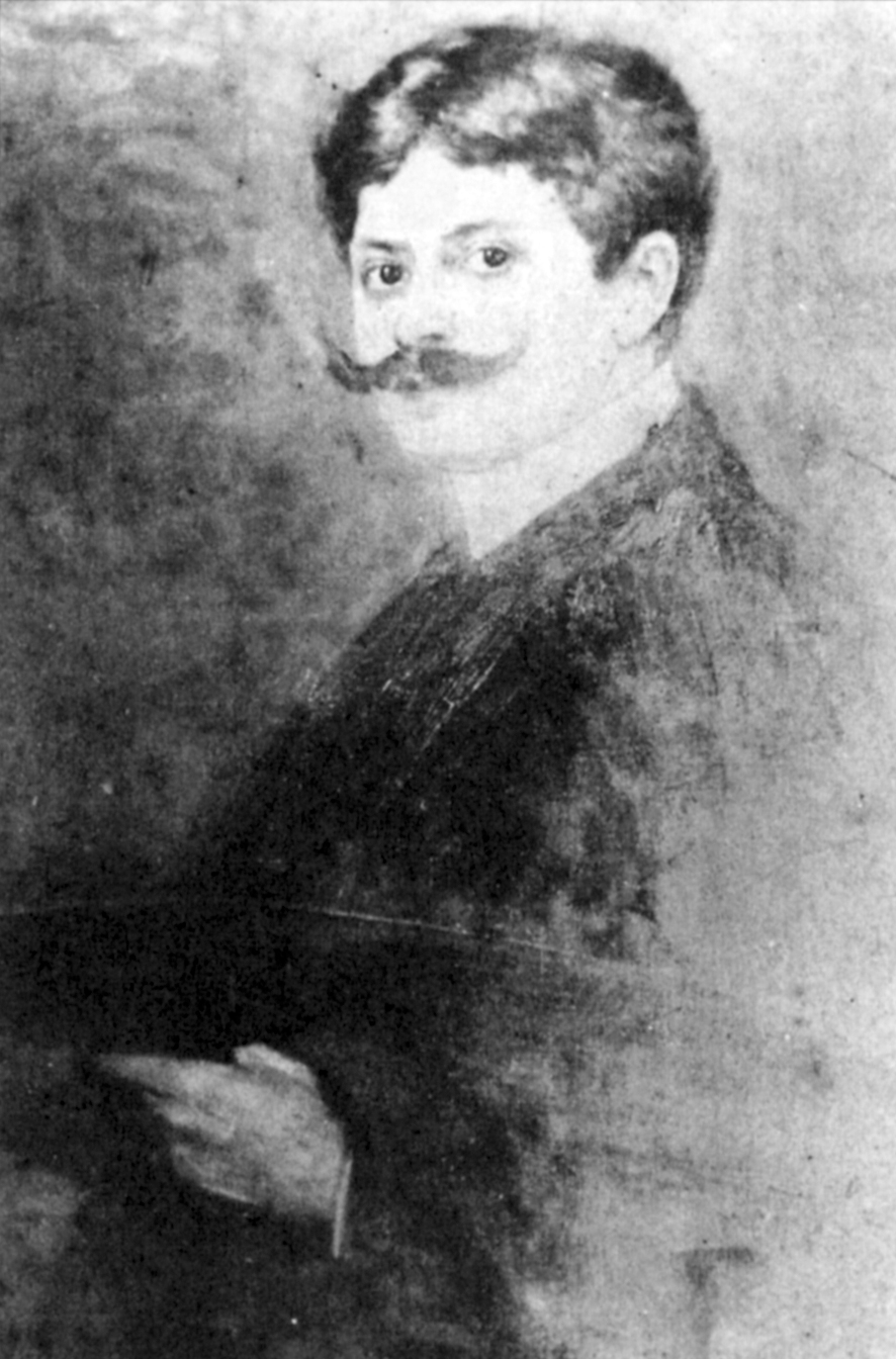 Franz Wallischeck (1865–1941), Selbstbildnis, reproduziert in Kurpfälzer Winzerfestanzeiger Ausgabe 1998